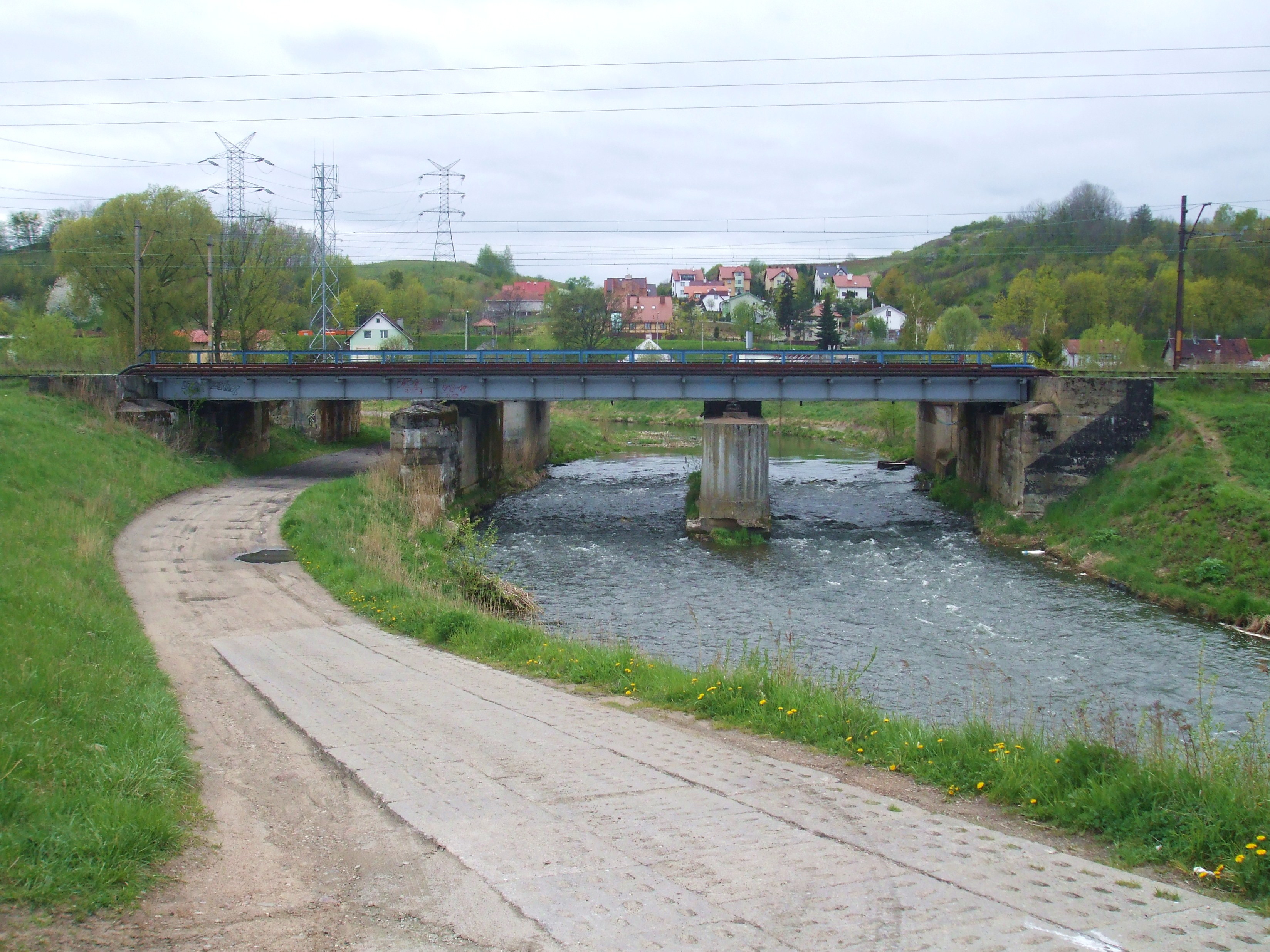 Gdańsk Orunia, most kolejowy na Raduni.